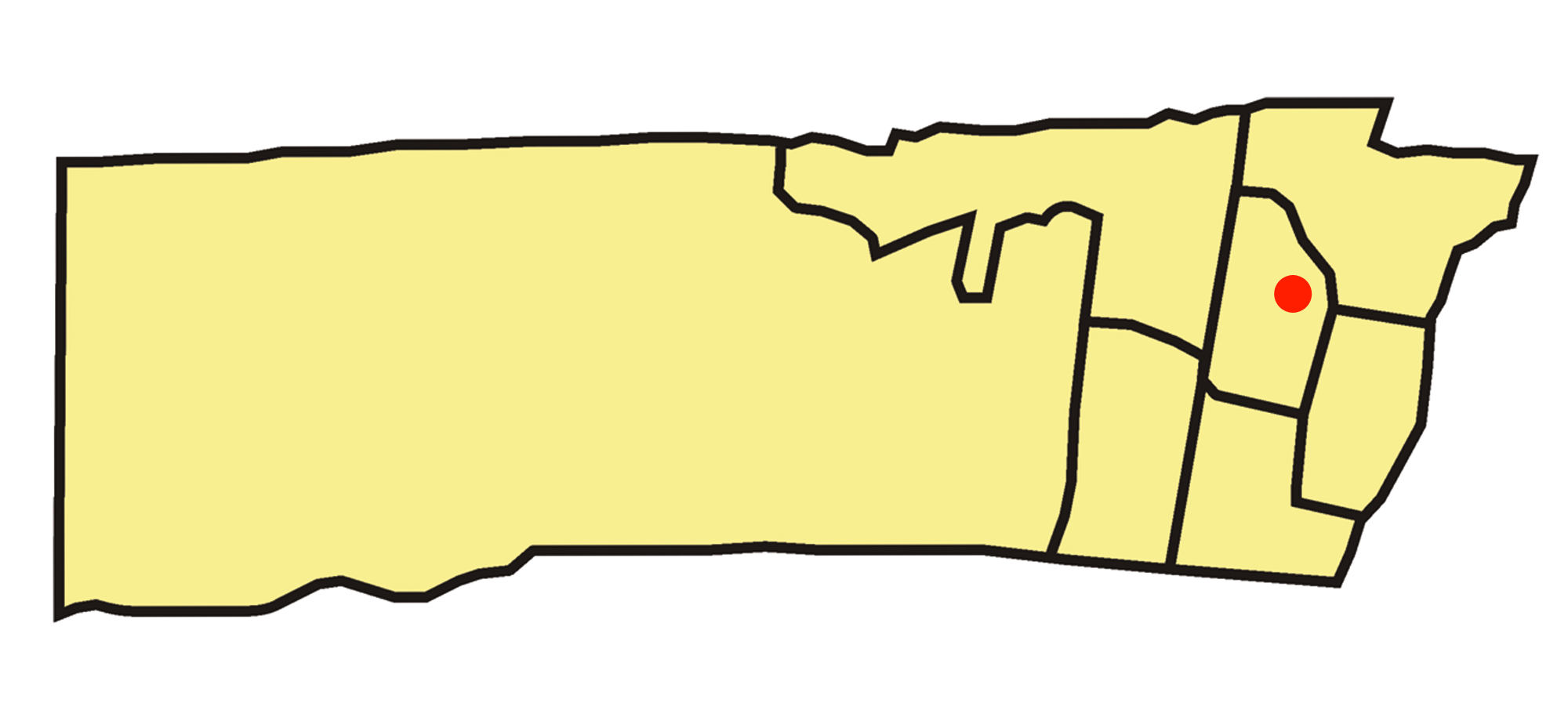 Capital Department, Mendoza, Argentina.